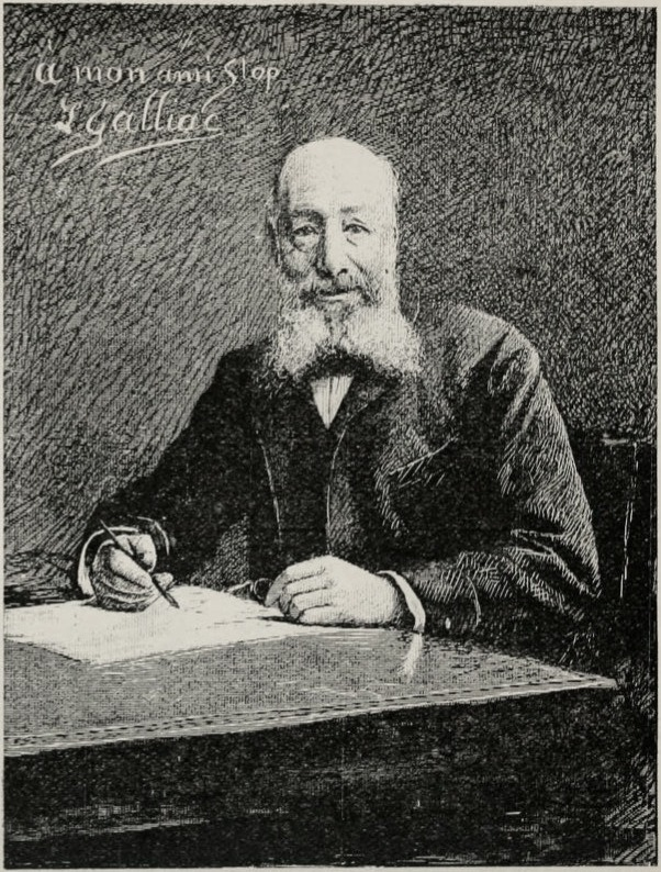 "Portrait de M. S. M.R ..."